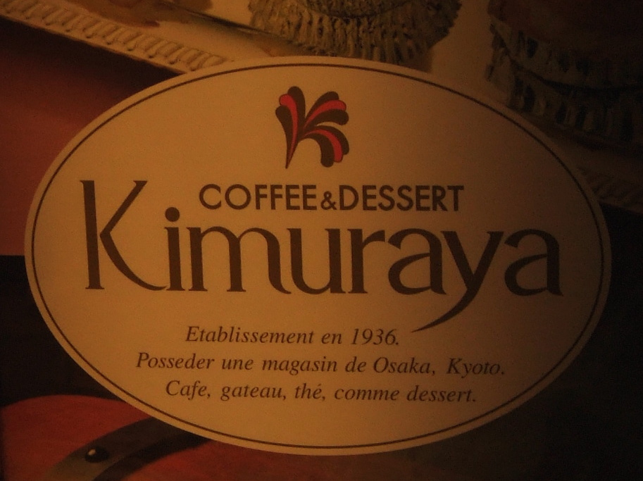 Un exemple de franponais sur un présentoir à Osaka. Il est marqué : Coffee & Dessert Kimuraya Etablissement en 1936. Posseder une magasin de Osaka, Kyoto. Cafe, gateau, thé, comme dessert.